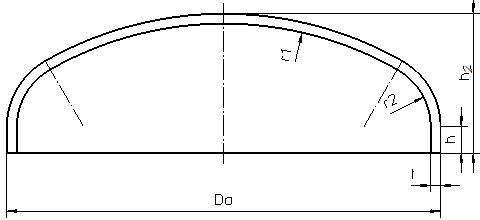 Klöpperboden (bumped boiler head) dimensioning